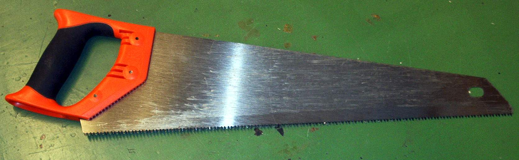 zelf gemaakte foto voor publiek domein. Martink